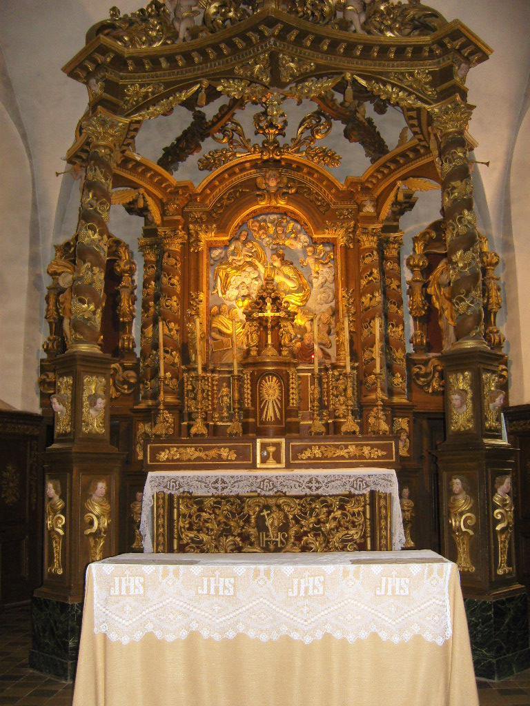 Ciborium de l'église des Hôpitaux-Neufs (IMH)